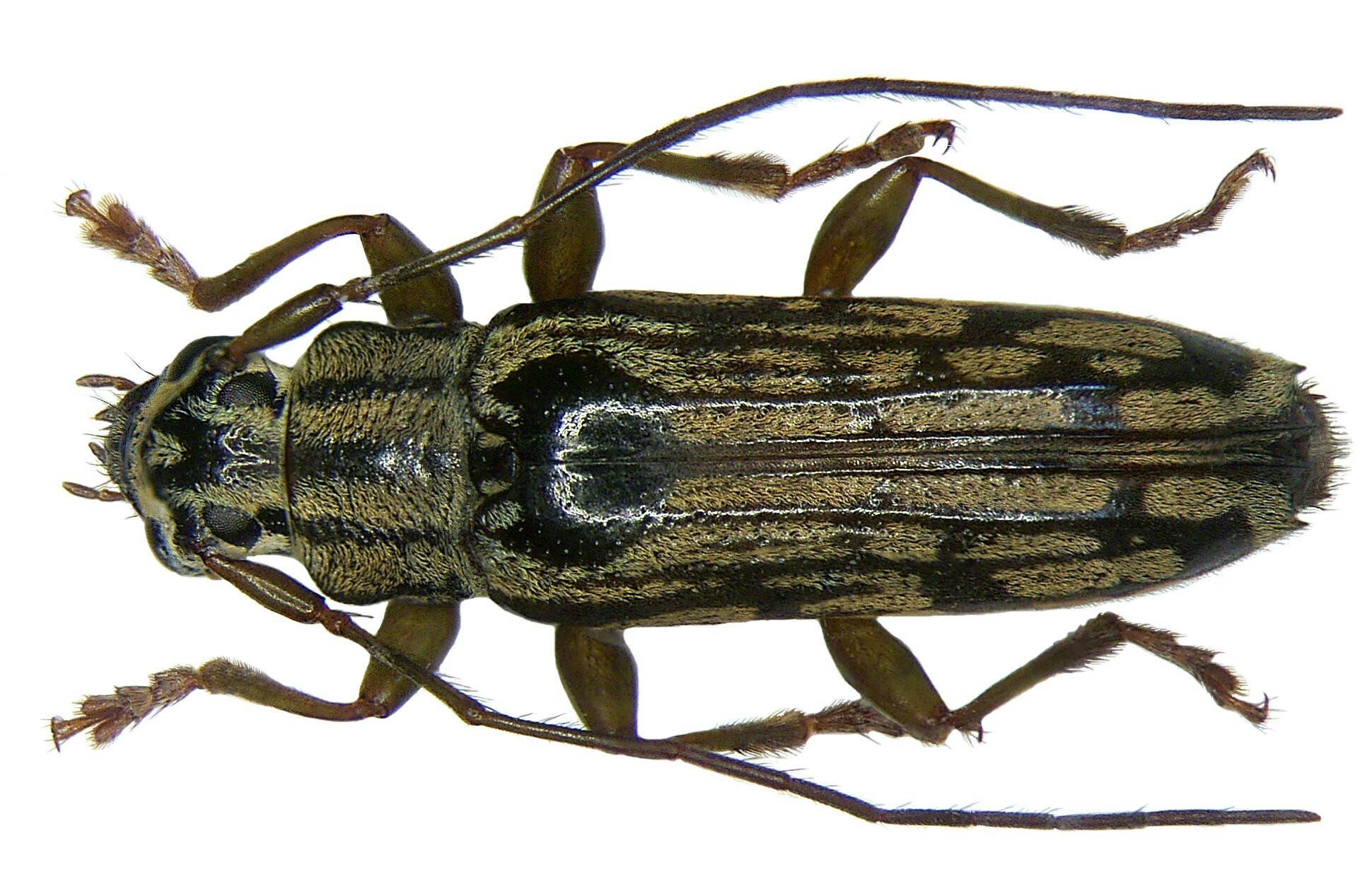 Familie: Cerambycidae Grösse: 10 mm Fundort: Indonesien, Irian Jaya, Ransiki leg. A.Skale, 2007; det. A.Weigel Foto: U.Schmidt, 2007